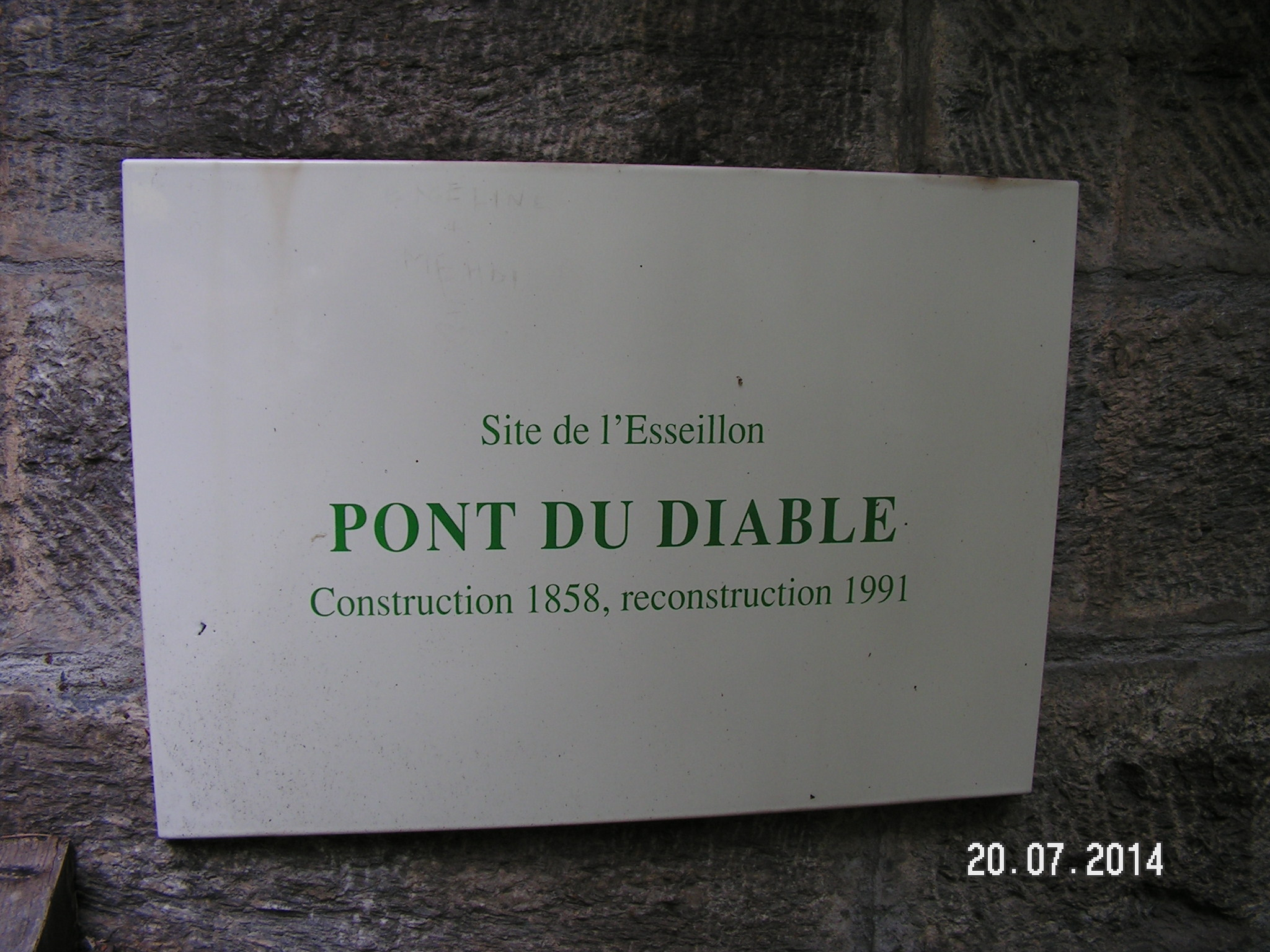 Pont du Diable